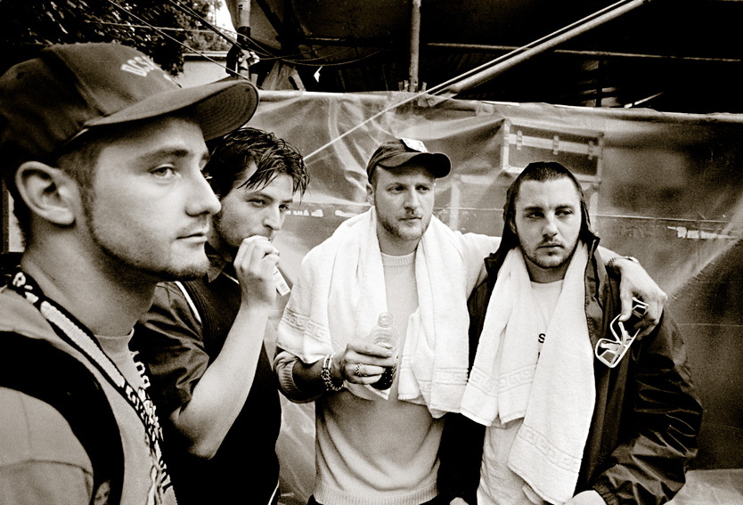 Rap Gruppe Fünf Sterne deluxe backstage im Stadtpark/ Hamburch